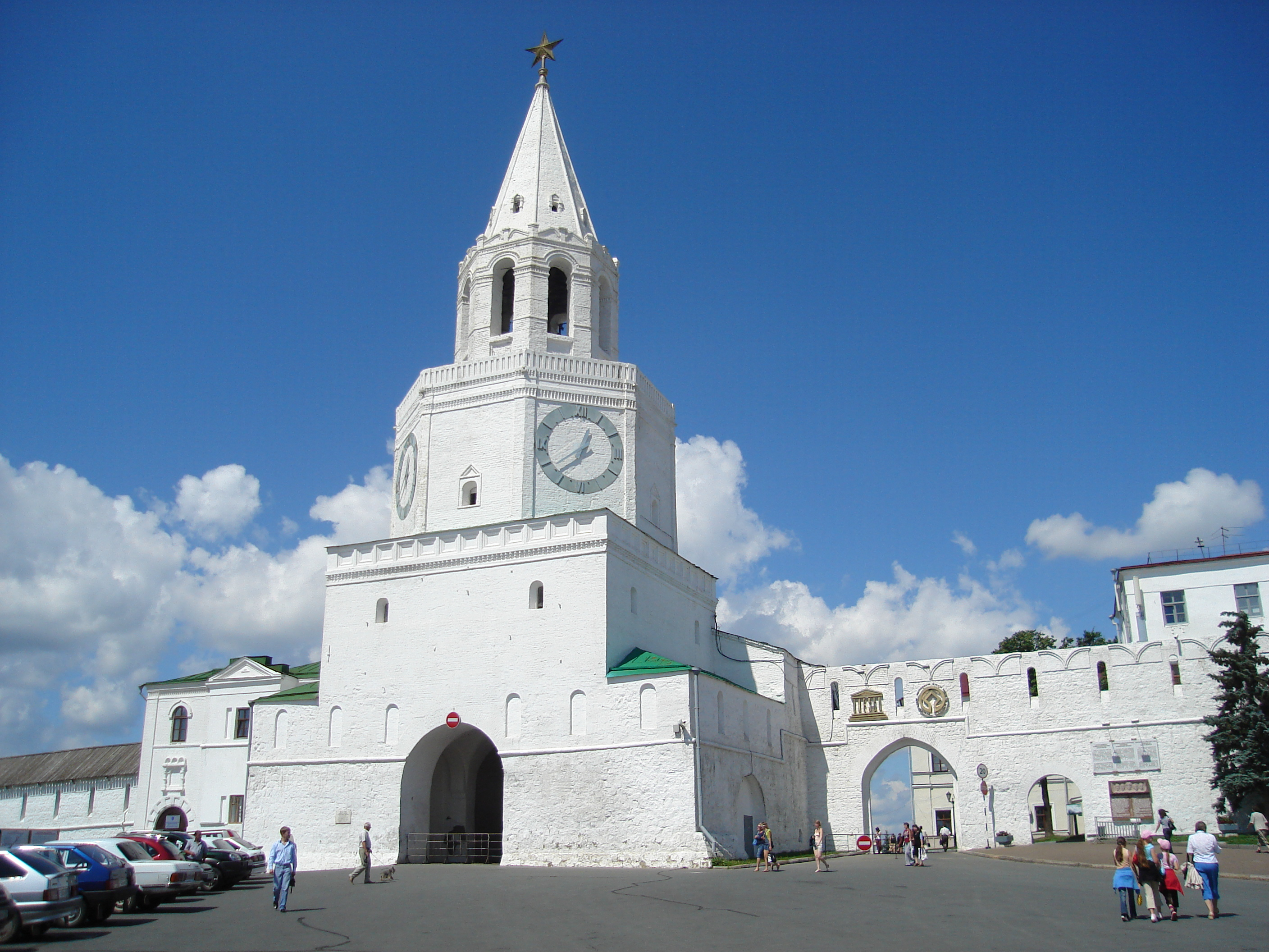 Spasskaya Tower